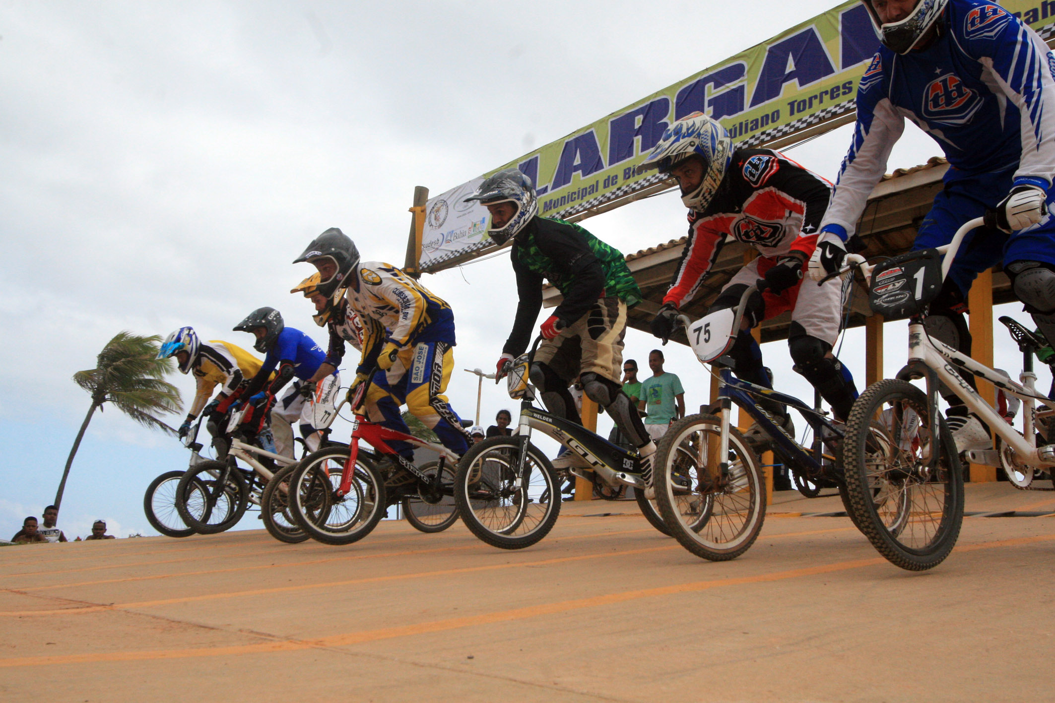 Cerca de 500 atletas de 14 estados do Brasil, divididos em 38 categorias, participaram das competições realizadas desde o último dia quatro. Foto: Aristeu Chagas / AGECOM